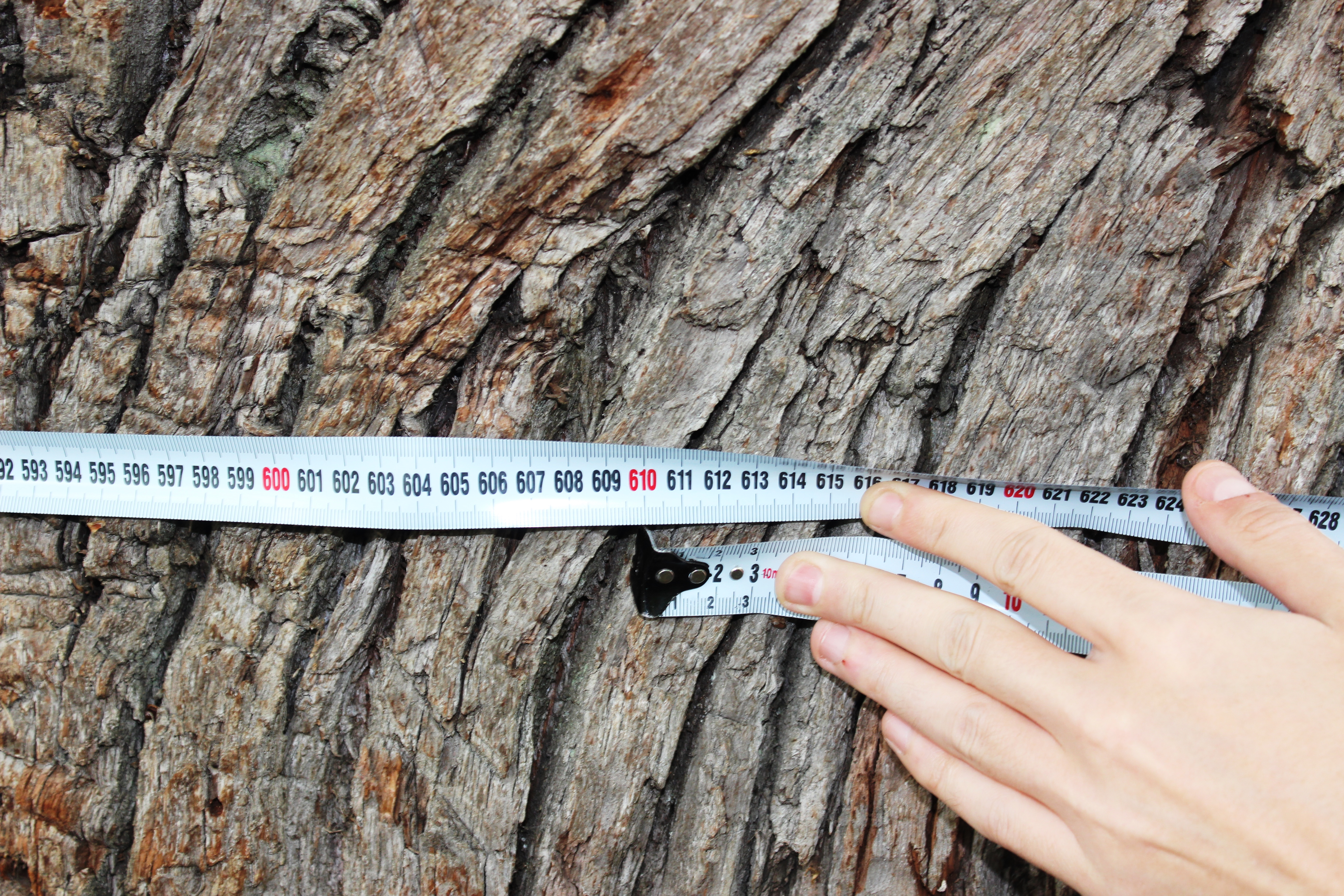 Дуб на синій воді, Голосіївський район, в межах ландшафтного заказника «Жуків острів». Найпівнічніша точка острова на р. Віта. Дорога з вул. Лісничої у напрямку комплексу відпочинку «Маячок». Не переходити дамбу, в кінці якої дуб "Знак оклику", а звернути вліво на грунтівку і йти до кінця острова.